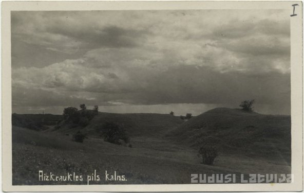 Aizkraukle linnamägi